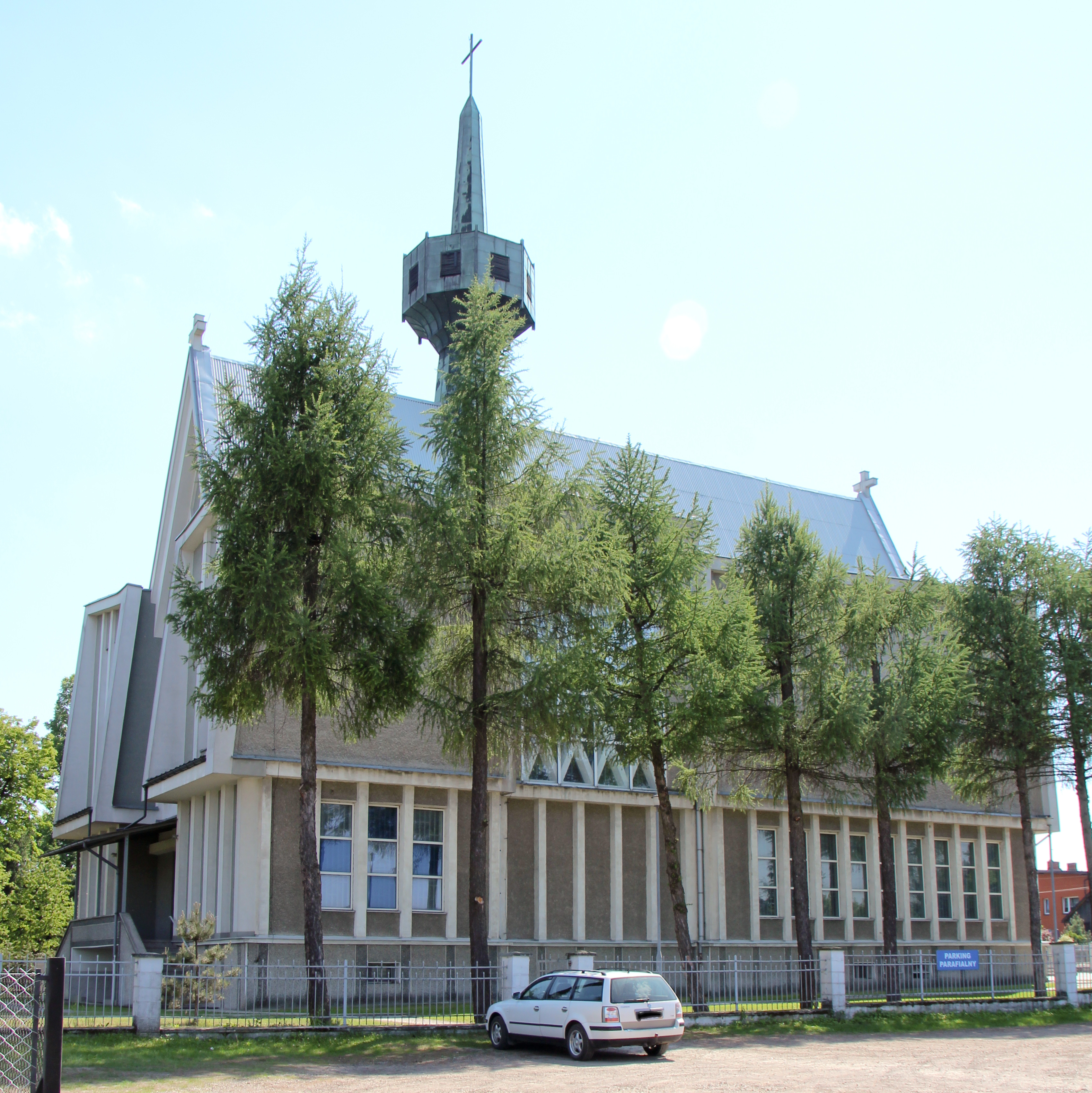 Kościół pw. Niepokalanego Serca Najświętszej Maryi Panny w Strumianach, gmina Wieliczka.